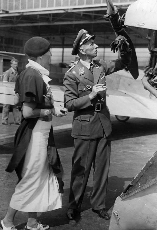 Berlin, Deutschlandflug, Theo Osterkamp mit Braut Zum Deutschlandflug 1933 Pilot [Theodor] Osterkamp besichtigt mit seiner Braut sein Flugzeug [Fliegerin Fel Gudrun Pagge und Theodor Osterkamp] Abgebildete Personen: Osterkamp, Theodor: Generalmajor, Ritterkreuz (RK), Luftwaffe, Orden Pour le mérite, Deutschland (GND 124745822)